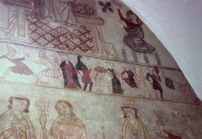 Ørslev Kirke (Slagelse Kommune) i Danmark. Sydkapellet østvæg mod syd